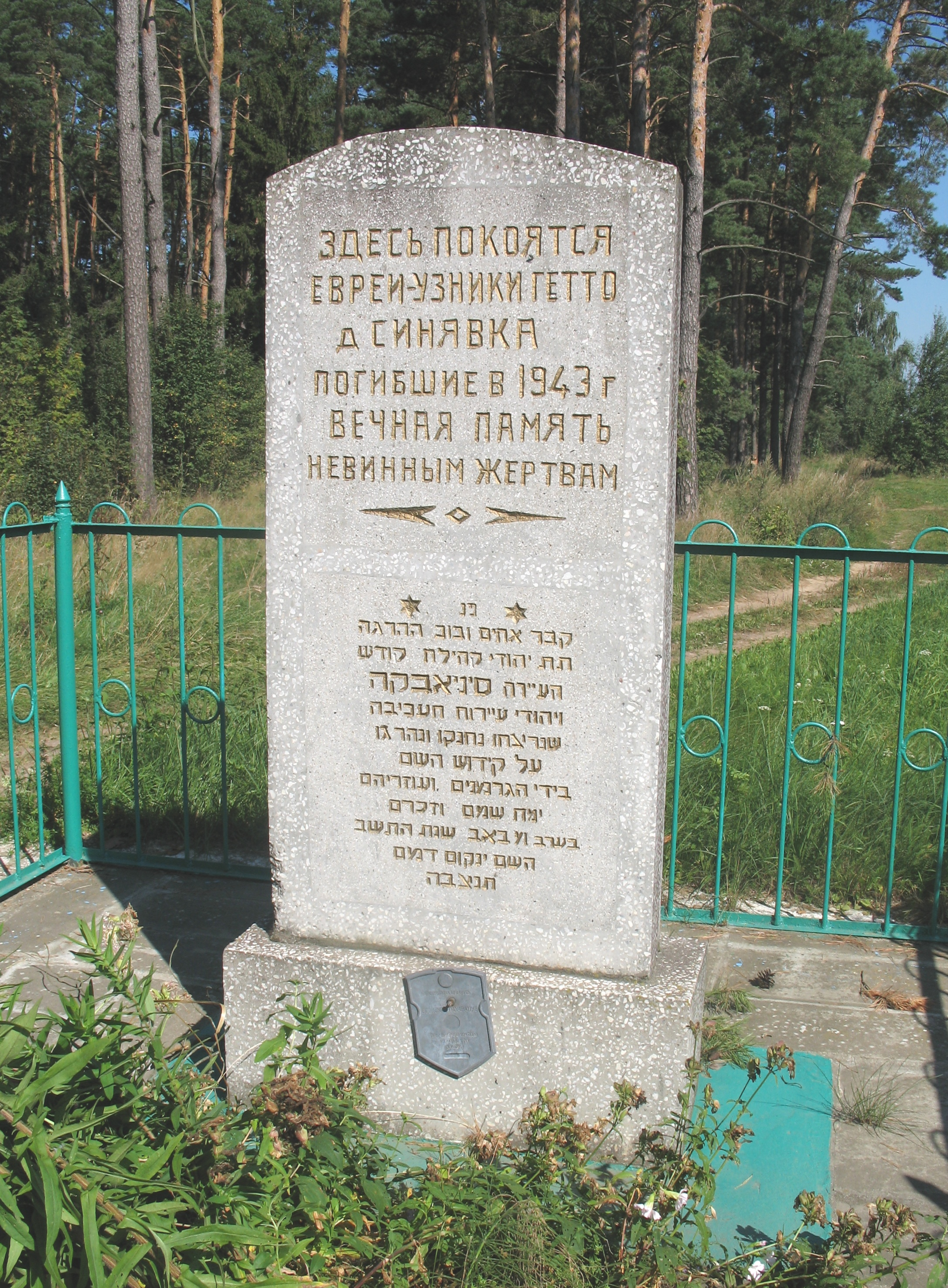 Памятник на братской могиле на месте массового убийства в августе 1943 года евреев деревни Синявка (Минская область, Клецкий район, Синявский сельский Совет). Находится на окраине деревни Нарешевичи этого же сельсовета. Стела из гранита установлена в 1995 году.